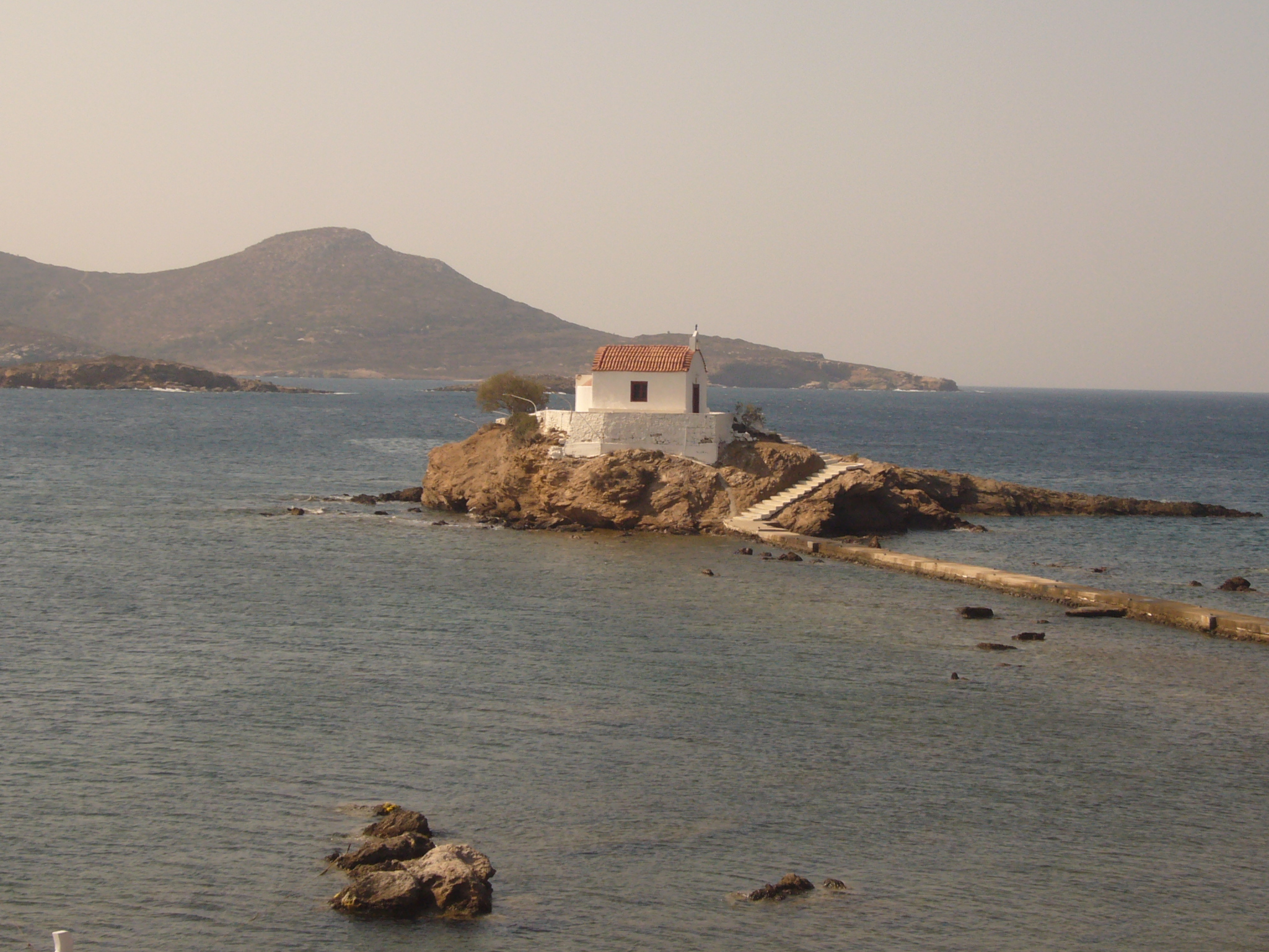 Kapelle des Heiligen Isidoros. Kapelle des Heiligen Isidorus Leros, vorgeschlagen von Benutzer:KV 28. Kapelle des Heiligen Isidoros, Leros.